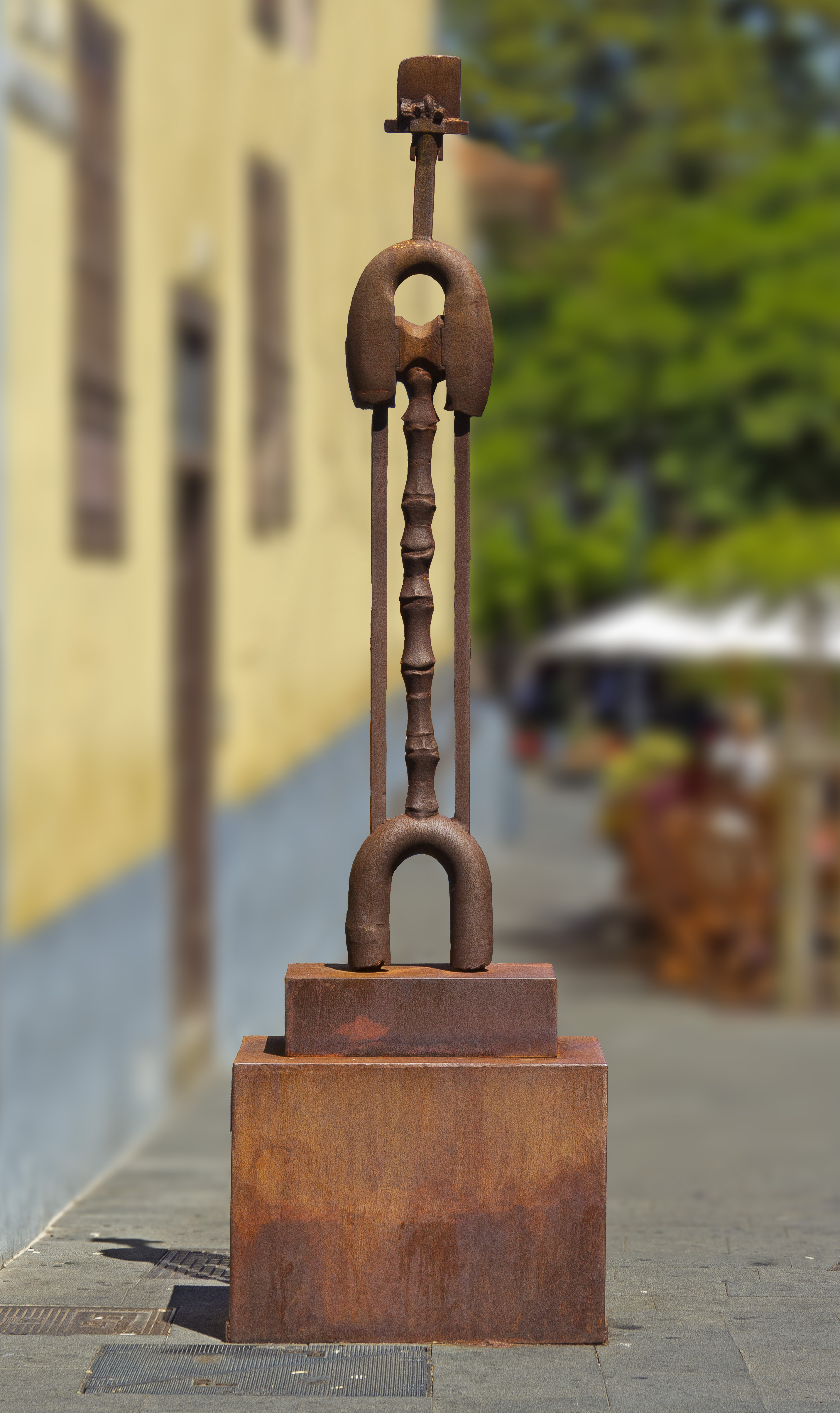 Die Skulptur des 1942 in La Laguna (Tenerife) geborenen Künstlers Juan José González Hernández-Abad befindet sich auf der Plaza de la Concepción in San Cristóbal de La Laguna auf Teneriffa.